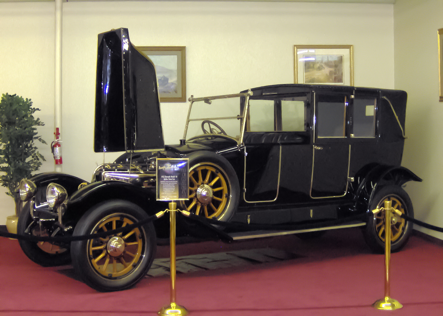 1922 Renault Model 40 Kellner Town Car